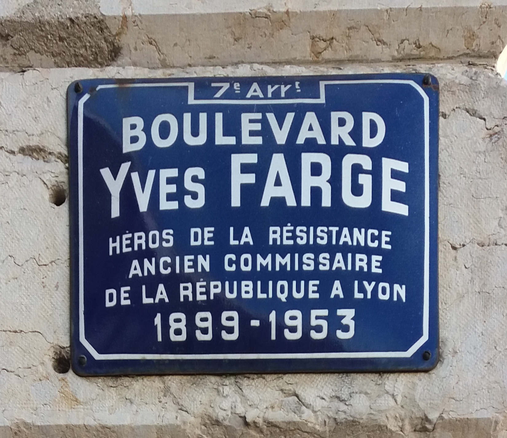 Plaque.